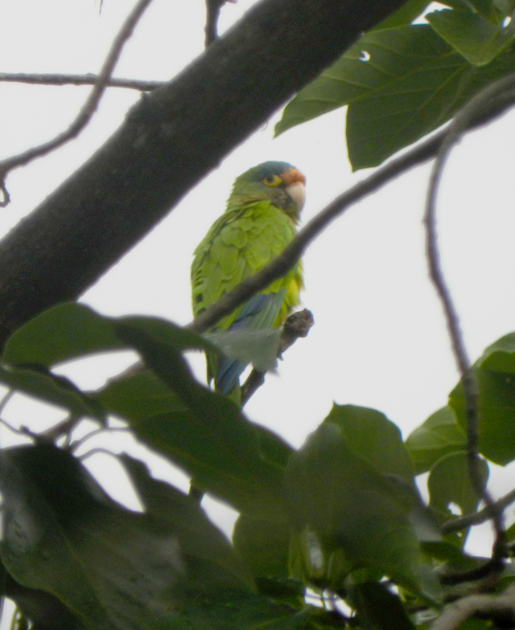 Eupsittula canicularis (Chocoyo) en El Crucero, Nicaragua.